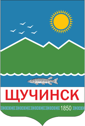 Герб Щучинска